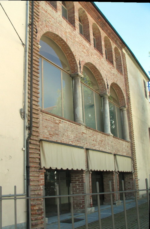 Asti Palazzo Zoya , foto fatta da me Faberh 2006.